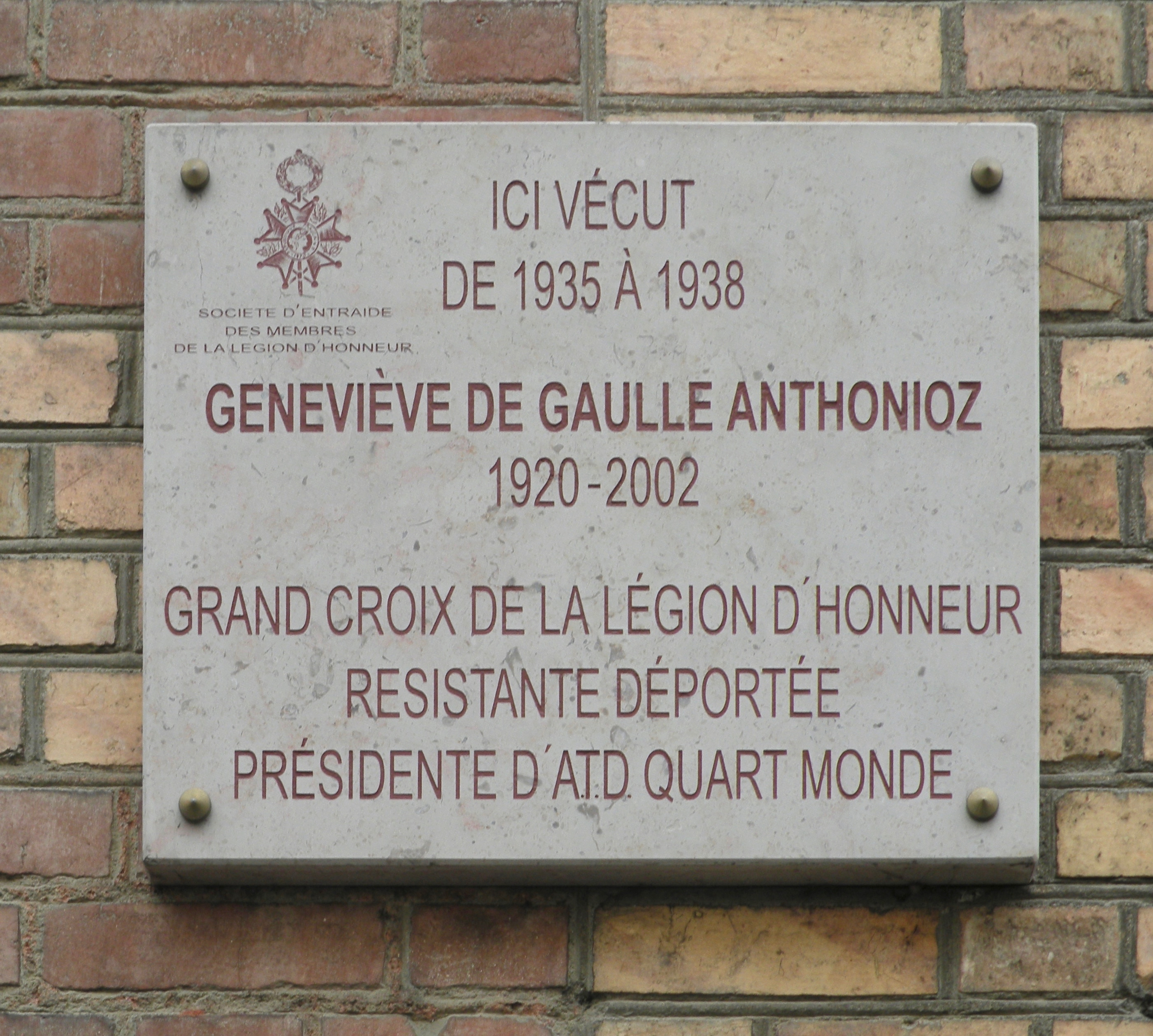 Maison où vécut Geneviève de Gaulle-Anthonioz de 1935 à 1938, 10 rue de Robien à Rennes.